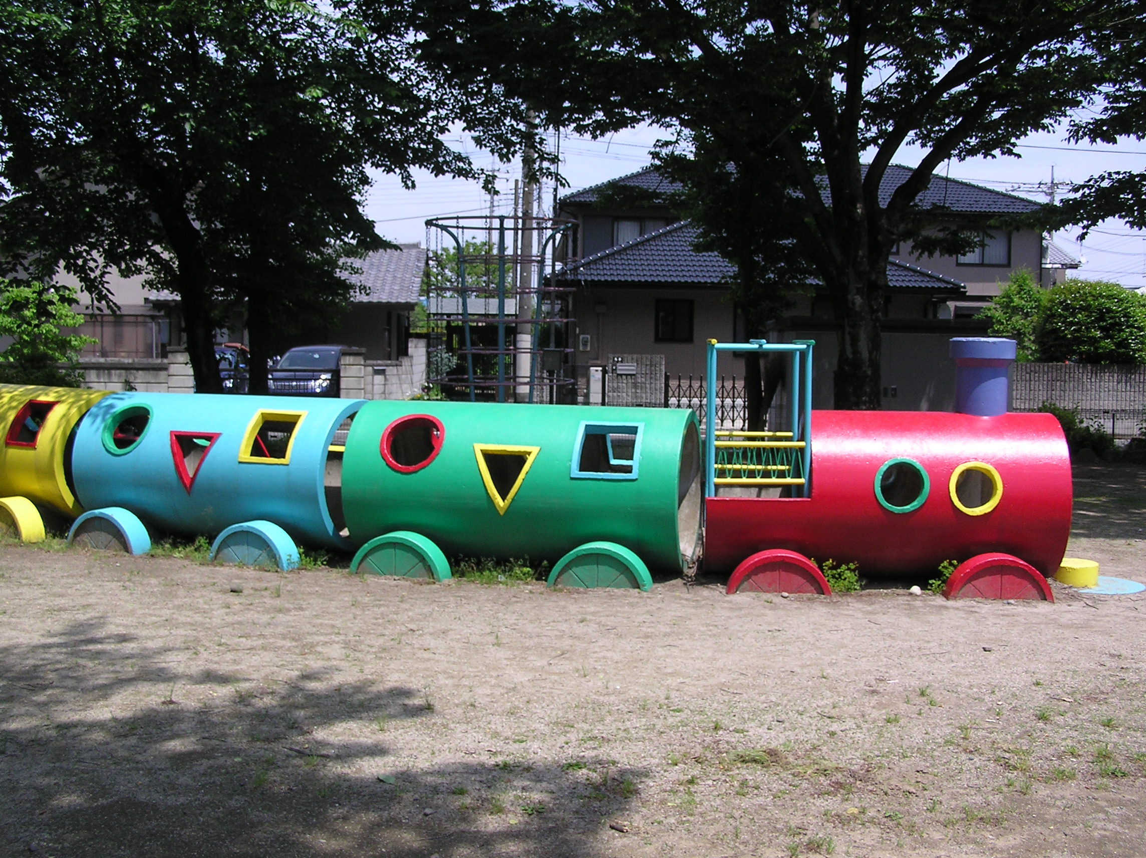 緑が丘公園（群馬県前橋市緑が丘町）